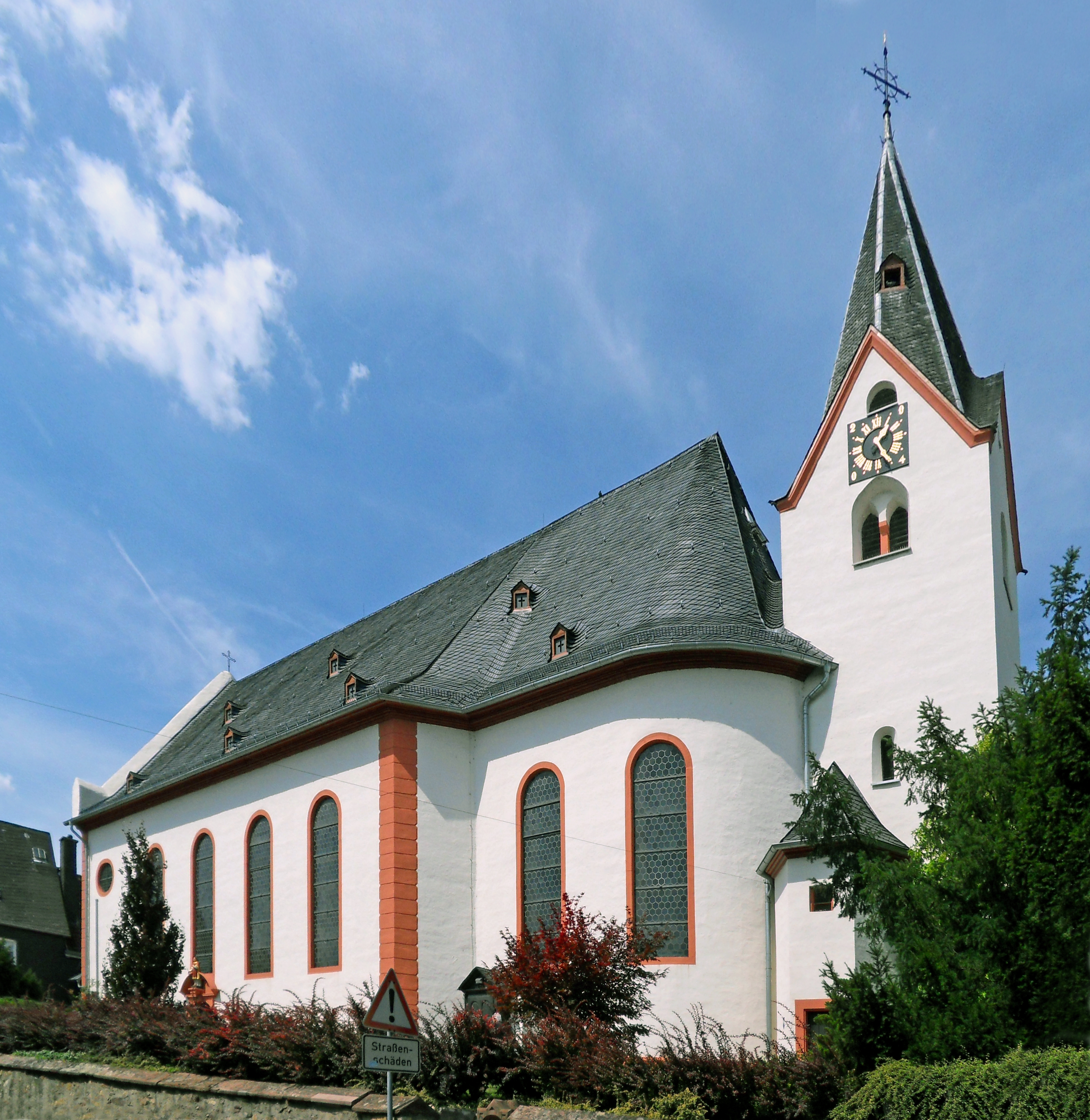 Katholische Pfarrkirche Sankt Vincentius in Hattenheim im Rheingau, Blick von Südosten